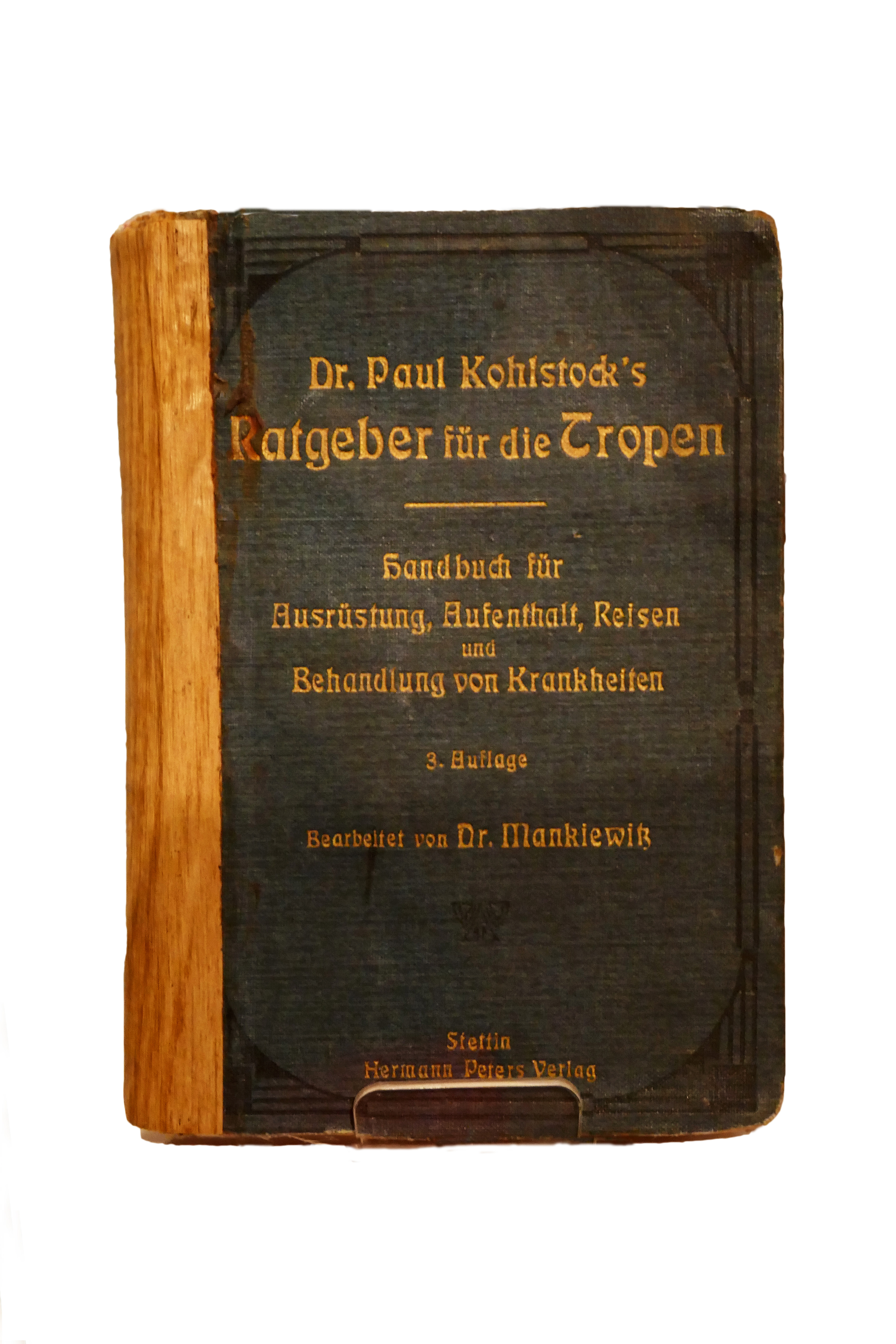 Dr. Paul Kohlstocks Ratgeber für die Tropen. 3. Auflage, Stettin, 1910. Museum im Ritterhaus (Offenburg). Ein Fenster zur Welt. Die kolonialzeitliche Sammlung.